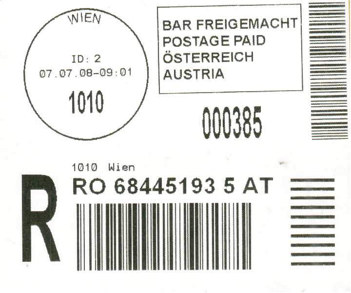 Poststempel mit Reko